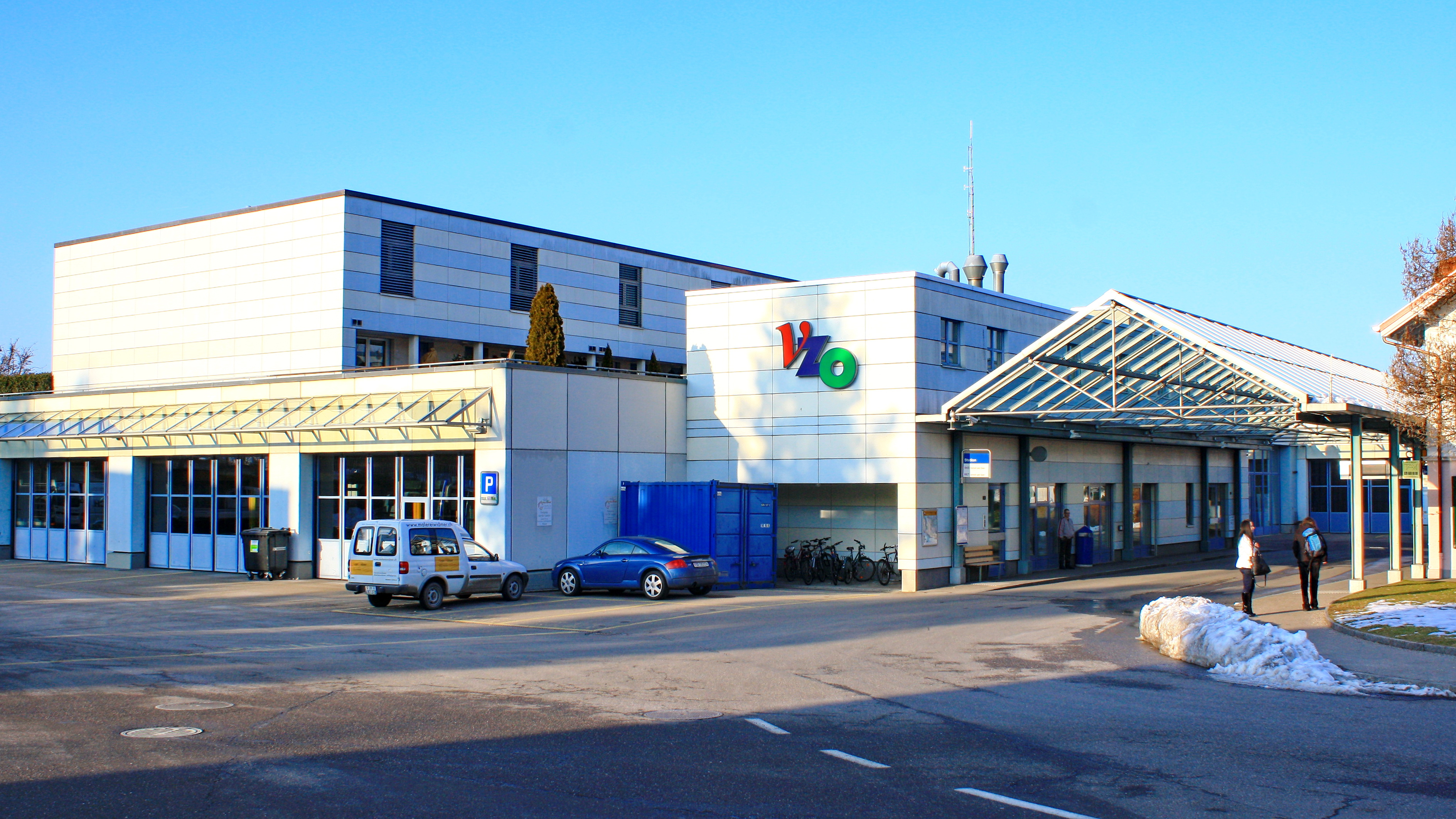 Grüningen (Switzerland)